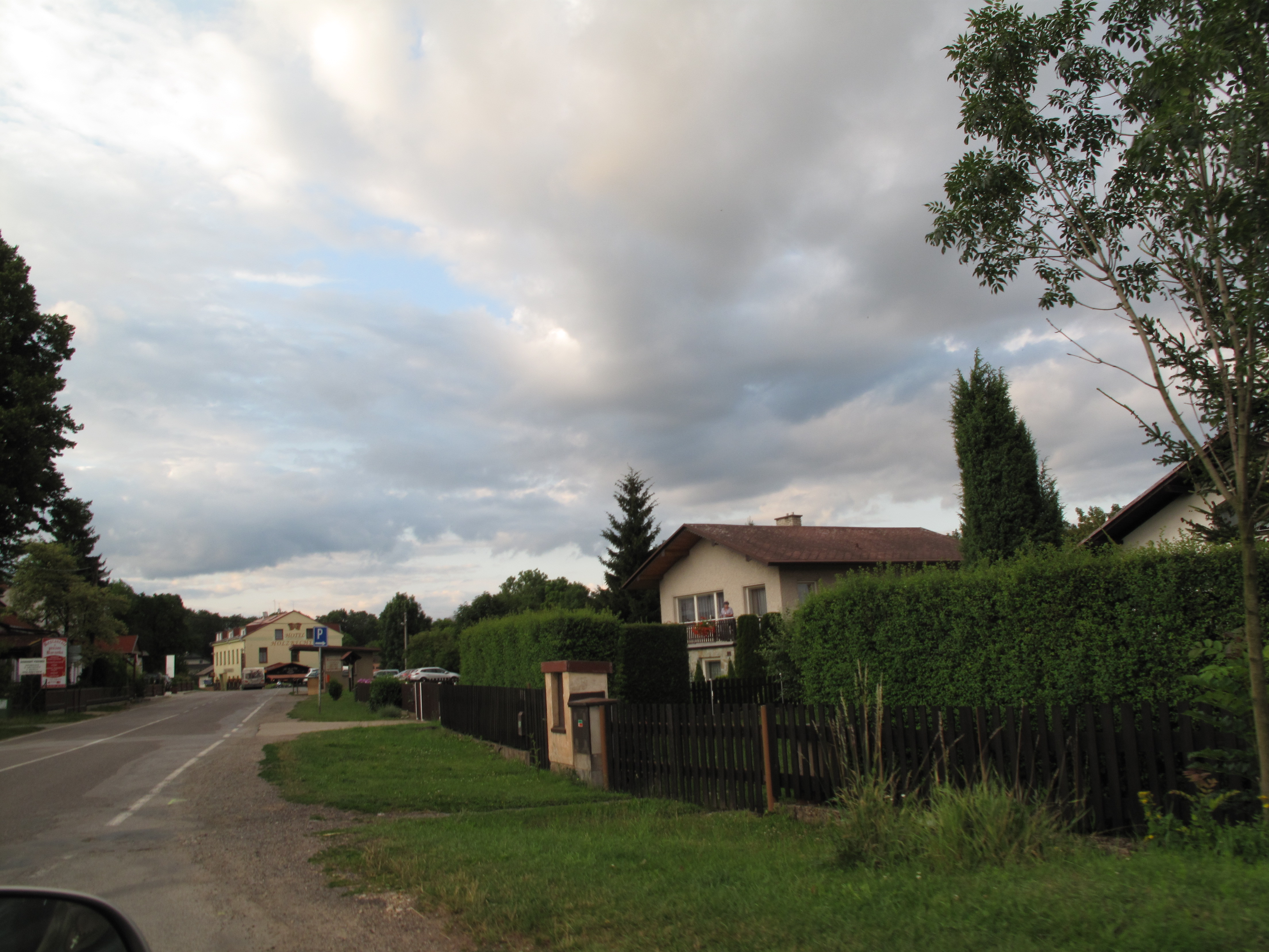 Zlíč